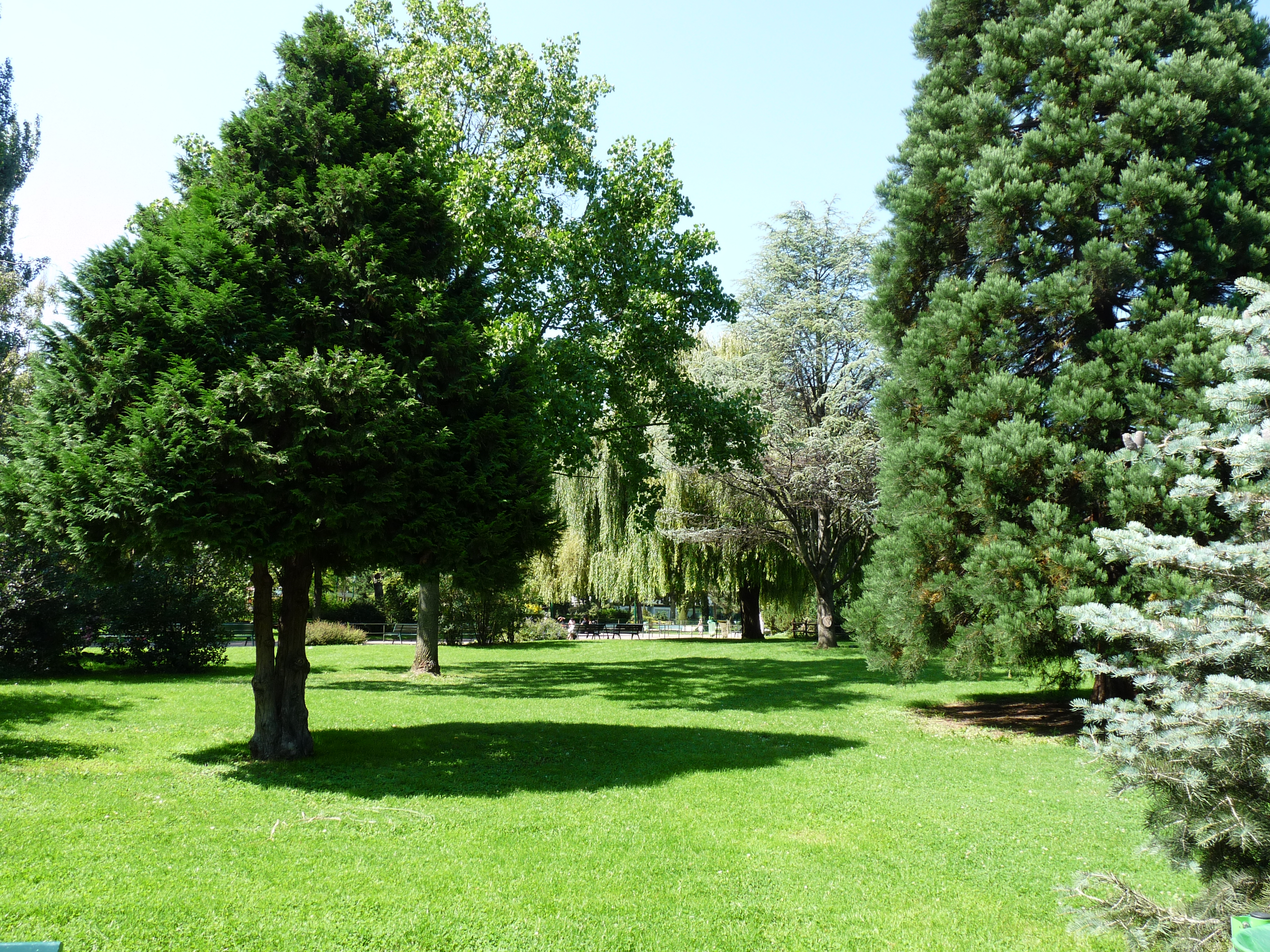 Le square Emmanuel Fleury à Paris